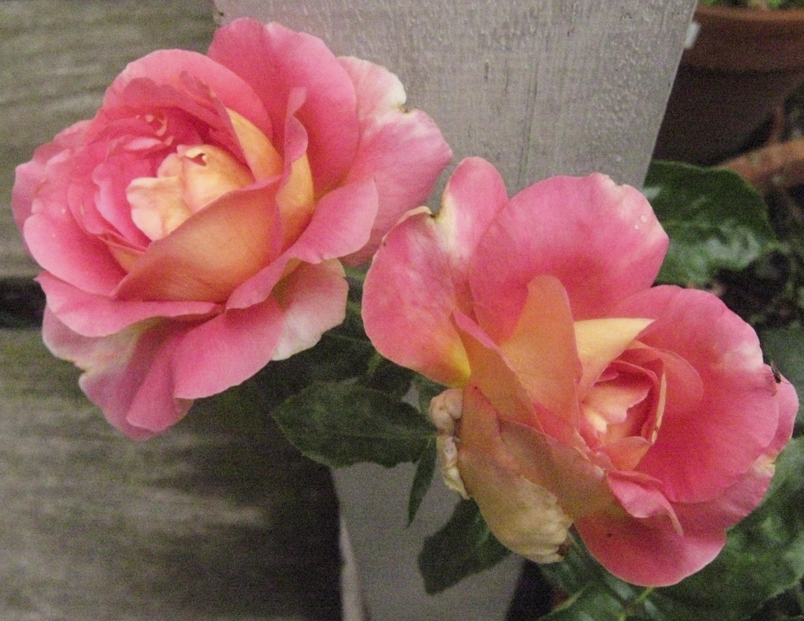 Rose Condesa de Sastago by Pedro Dot 1932